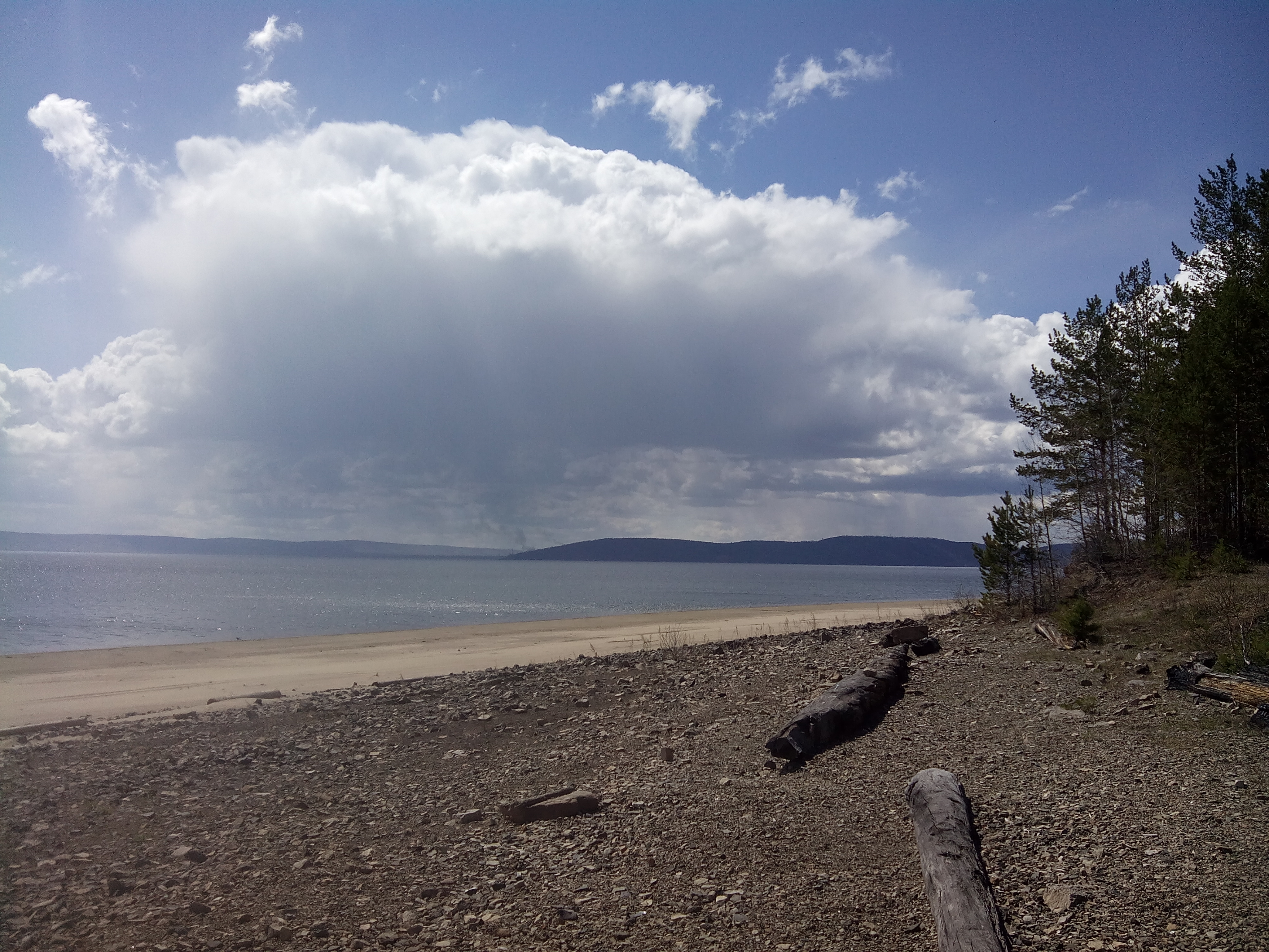 Курорт Братское Взморье, Братский район This image is related to the protected area of Russia number 3810046